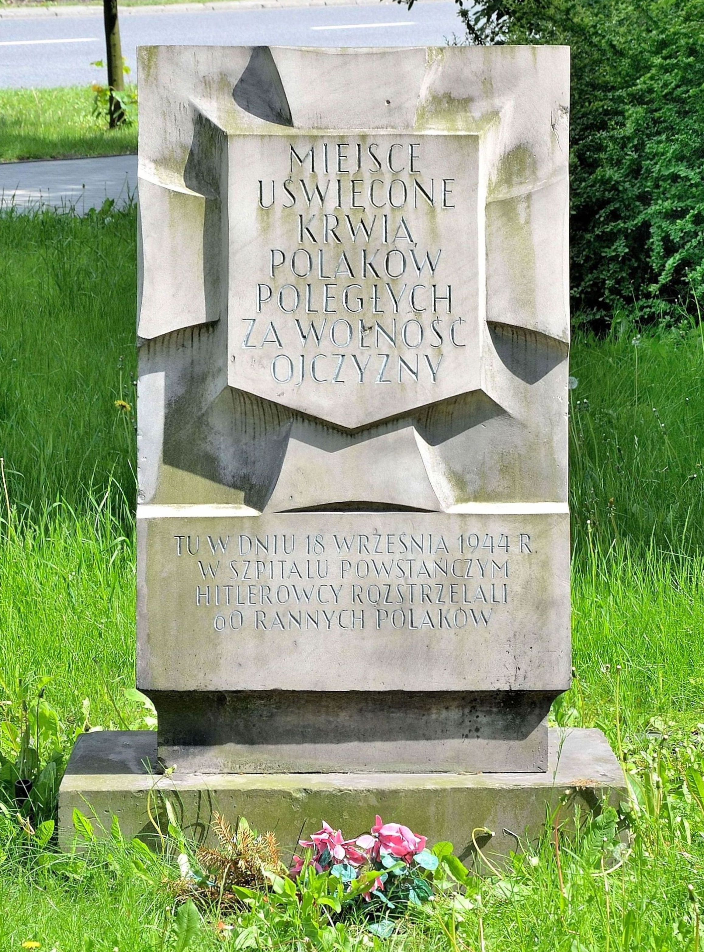 Tablica Tchorka przy ul. Solec (przy pomniku Chwała Saperom)